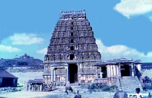 தேவிகாபுரம் பெரியநாயகி அம்மன் கோயில் 1970 களில்.